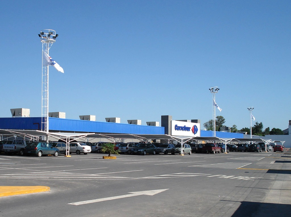 Hipermercado Carrefour en Tucumán, Argentina.